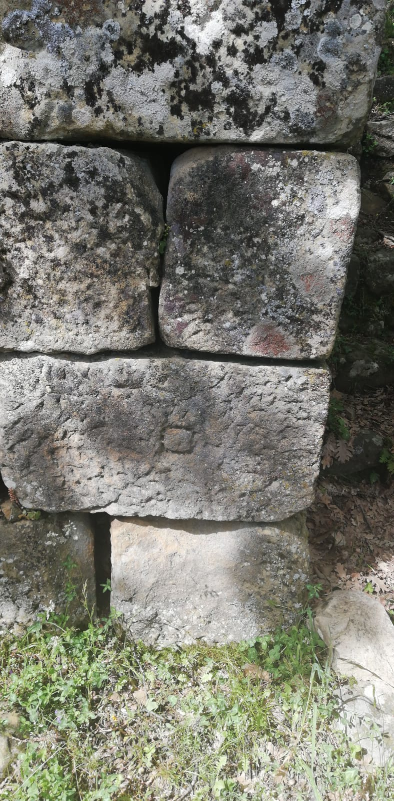 Dettaglio Segno di cava